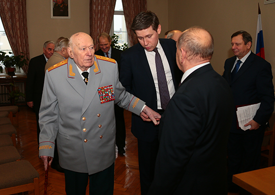 Члены Управления генеральных инспекторов МО РФ поздравляют с 90-летием со дня рождения участника Великой Отечественной войны генерального инспектора МО РФ генерала армии Филиппа Денисовича Бобкова